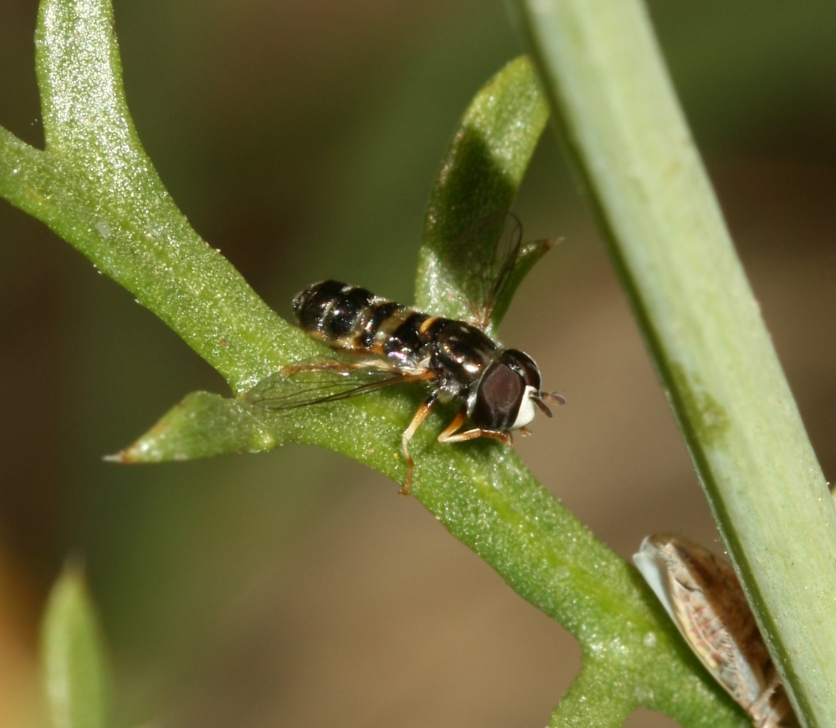 Argaka, Cyprus